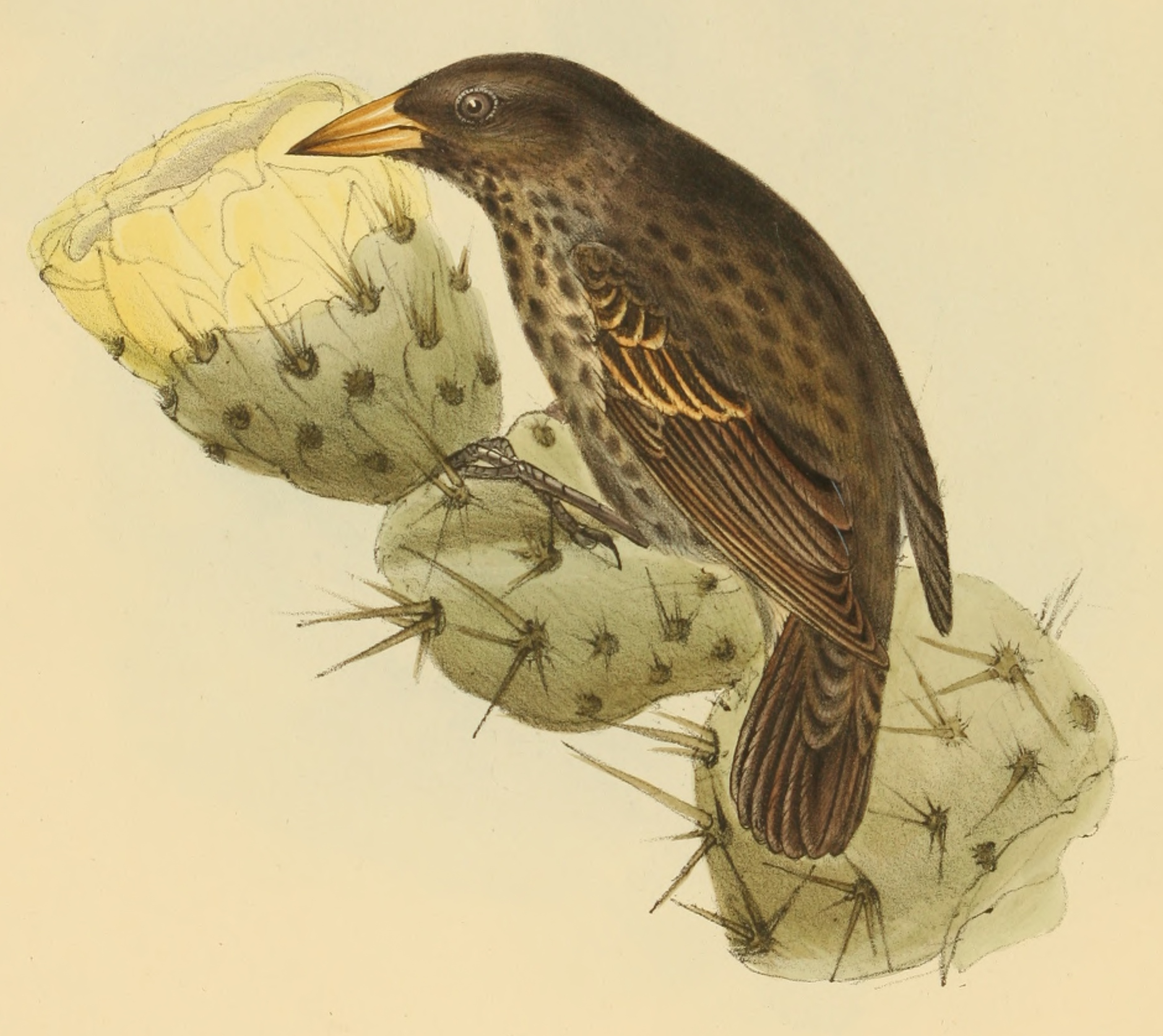 laut Bild: Cactornis assimilis